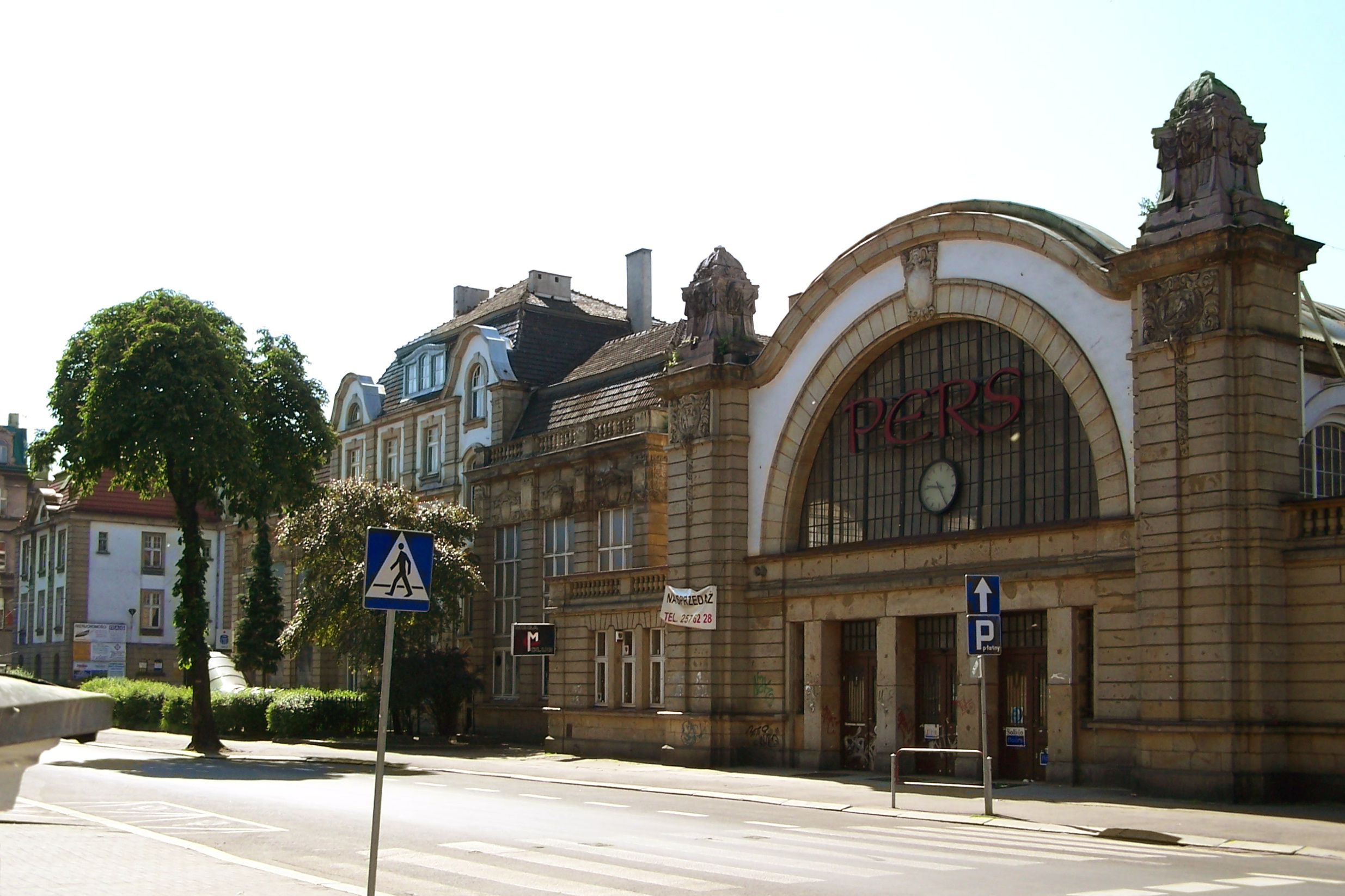 Železniční stanice Katowice - budova původního nádraží nacházející se nedaleko od té současné, Polsko